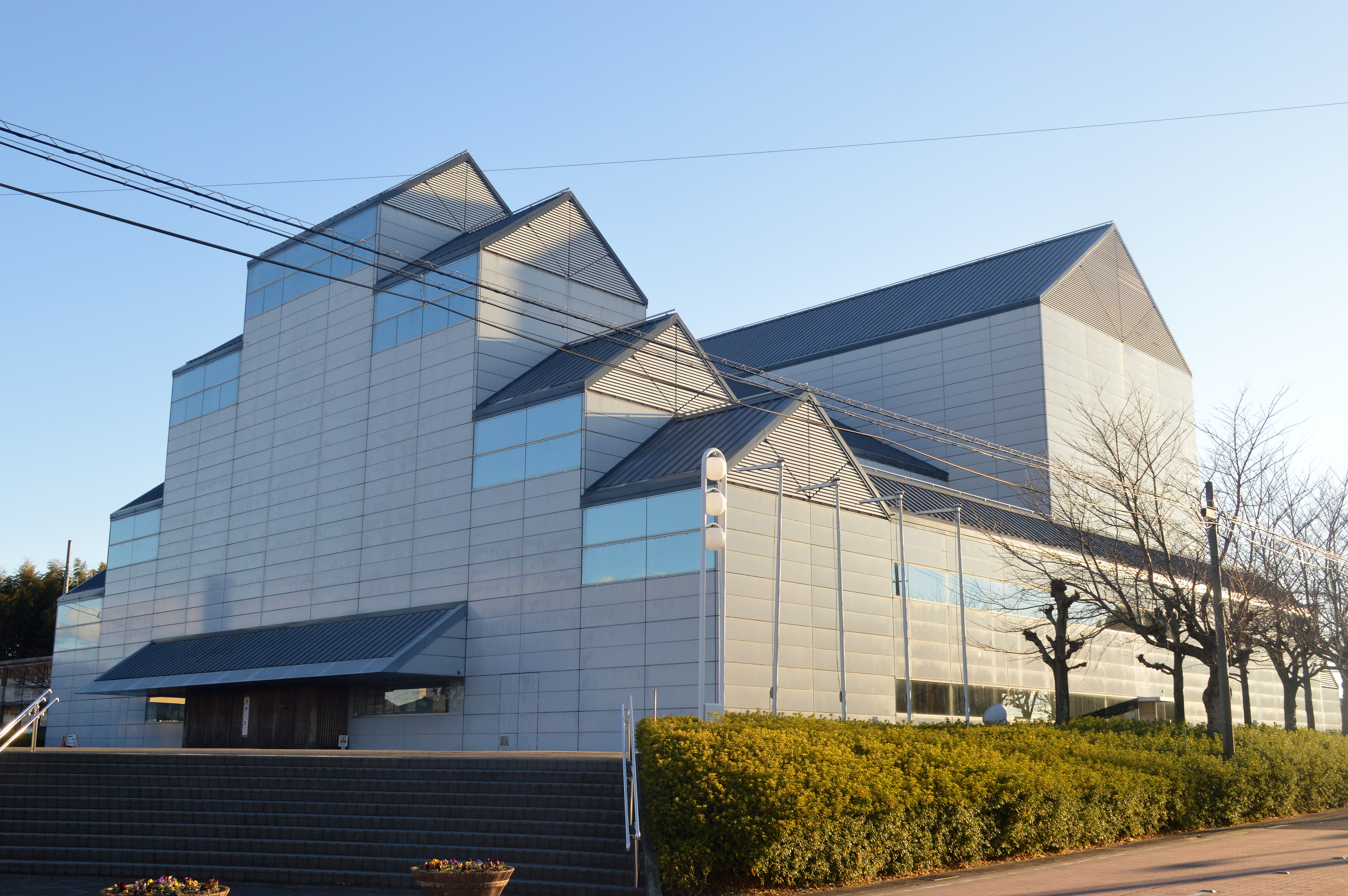 愛知県丹羽郡扶桑町にある扶桑文化会館。